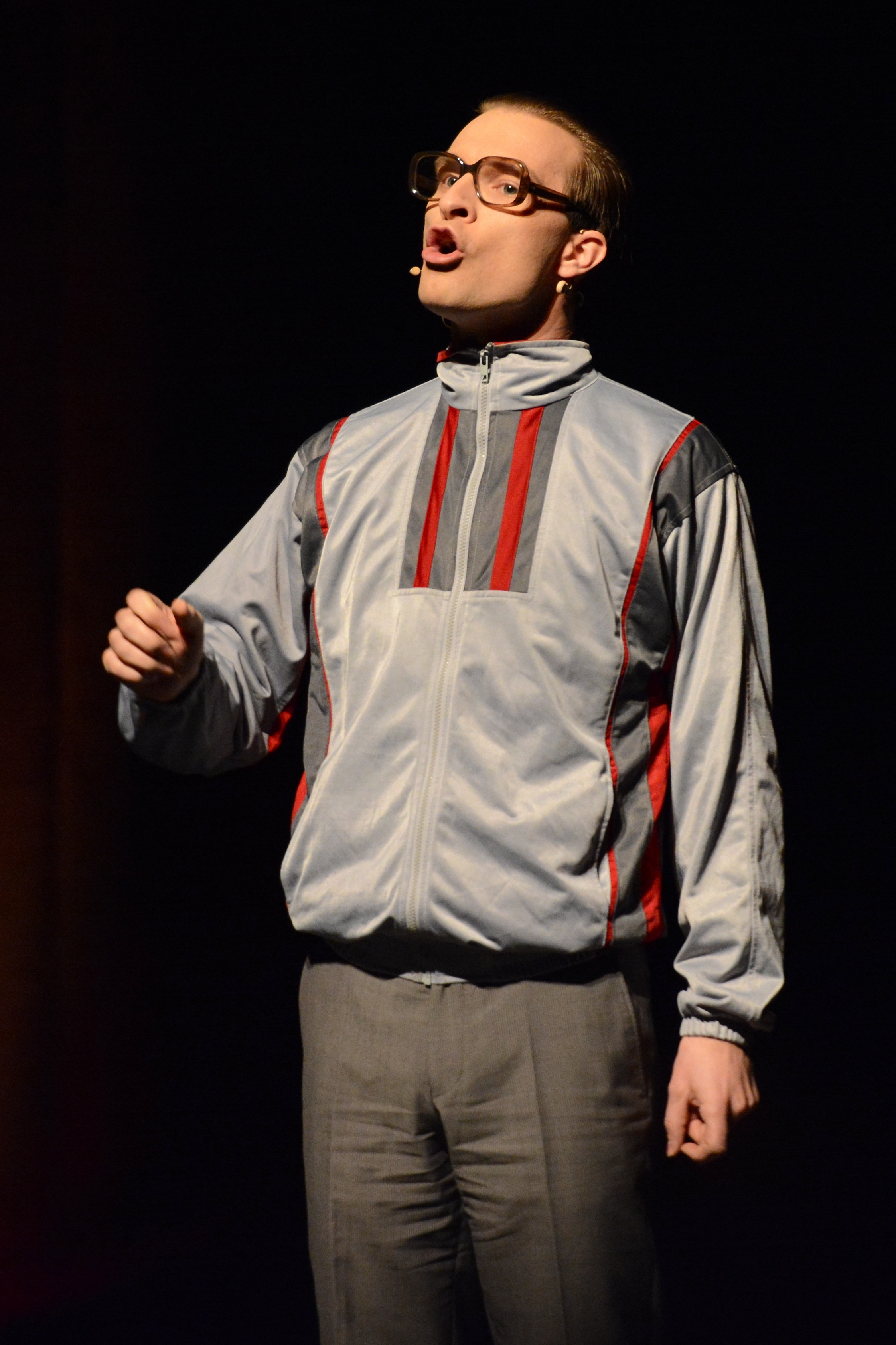 Erik Lehmann bei einer Vorrundenvorstellung von Das Schwarze Schaf 2014 in Wesel.